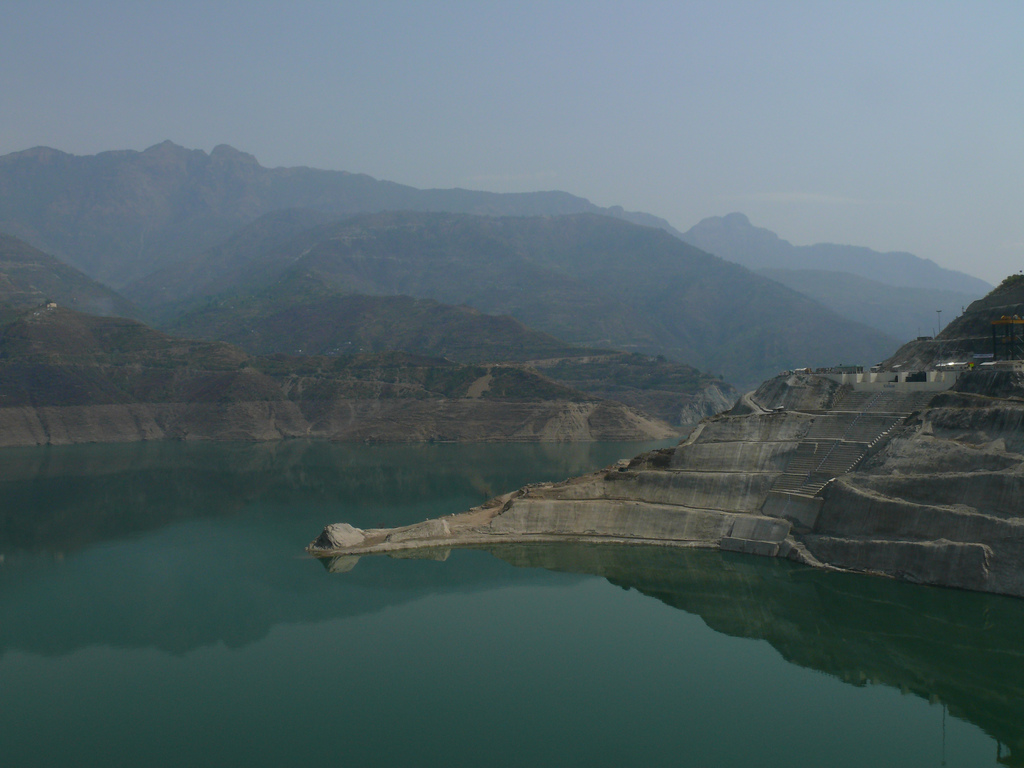 Tehri Dam lake